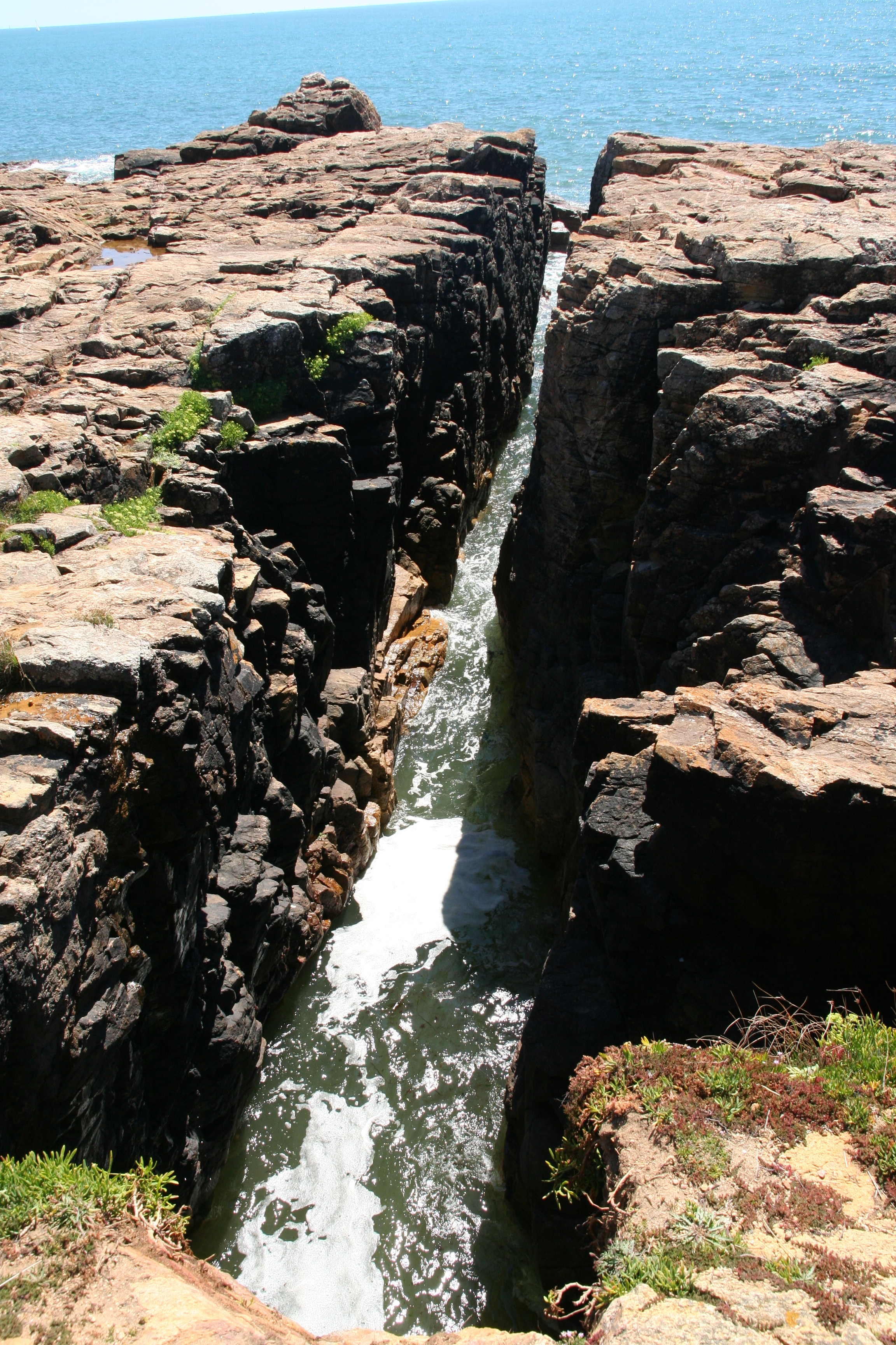 Curiosité géologique, Le Château d'Olonne